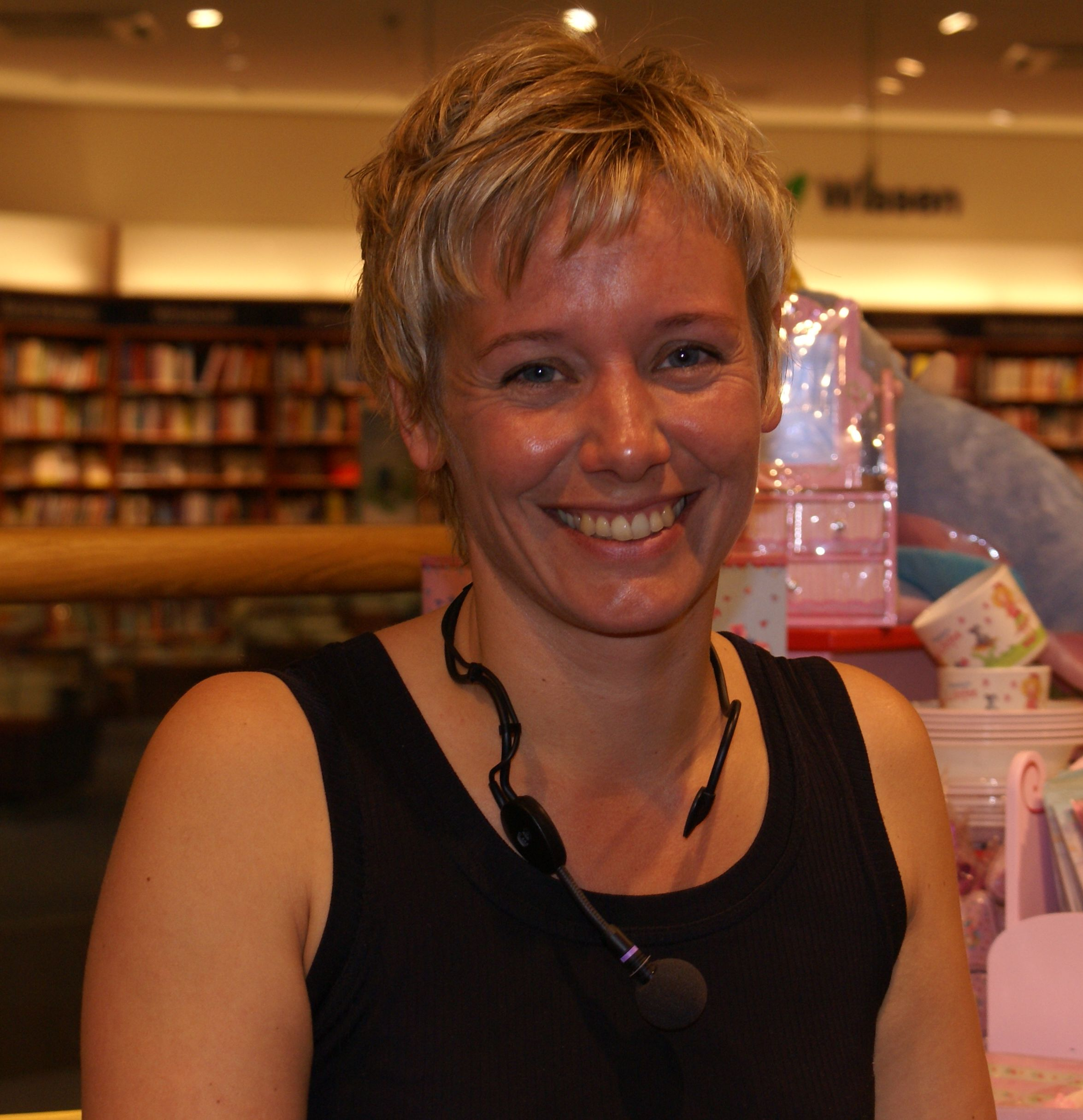 Sandra Luepkes bei einer Lesung in Münster am 7. Mai 2008.